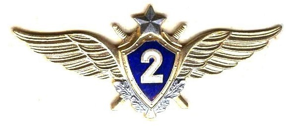 Нагрудный знак классной квалификации "Военный лётчик 2-го класса" образца 1995 года